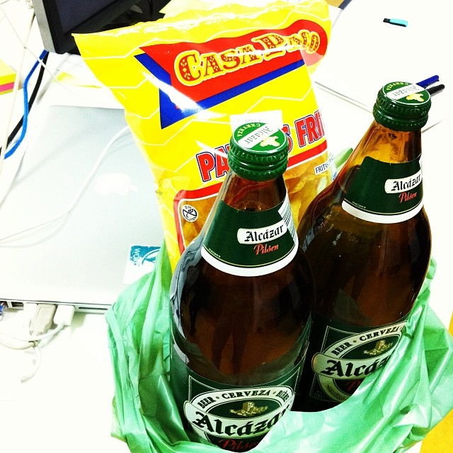 Dos litros de cerveza Alcázar y bolsa de patatas fritas de Casa Paco.